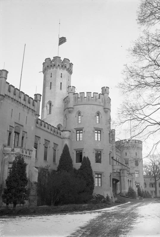 Schloss Sibyllenort, der letzte Wohnsitz des verstorbenen Exkönigs Friedrich August III. von Sachsen ! Blick auf das Schloss Sibyllenort b/Breslau mit der auf Halbmast angesetzten Königsstandarte. Das Sterbezimmer.